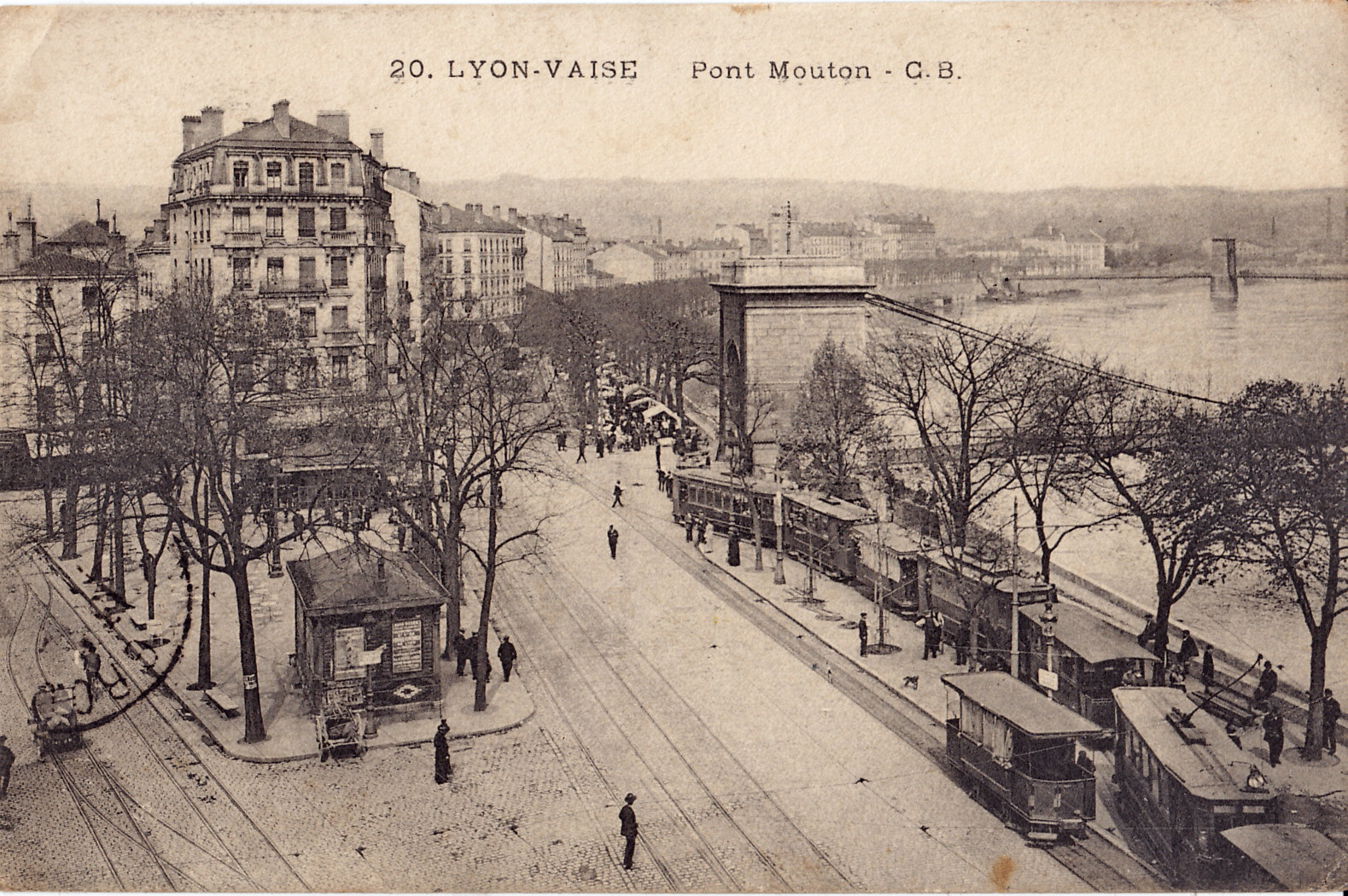 Carte postale ancienne éditée par CB (Chambon à Bordeaux), n°20 : LYON-VAISE - Pont Mouton